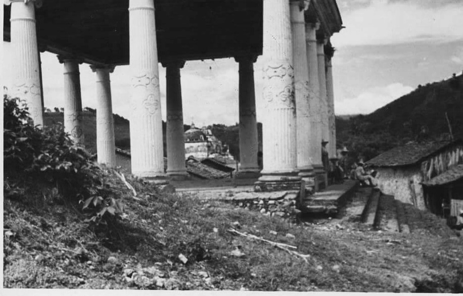 Templo de Minerva de Quetzaltepeque en 1920.